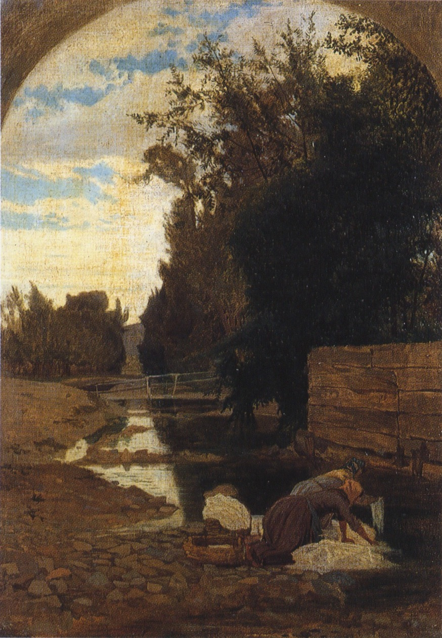 Lavandaie a Carcare, dipinto su tela del 1866 di Ernesto Rayper.